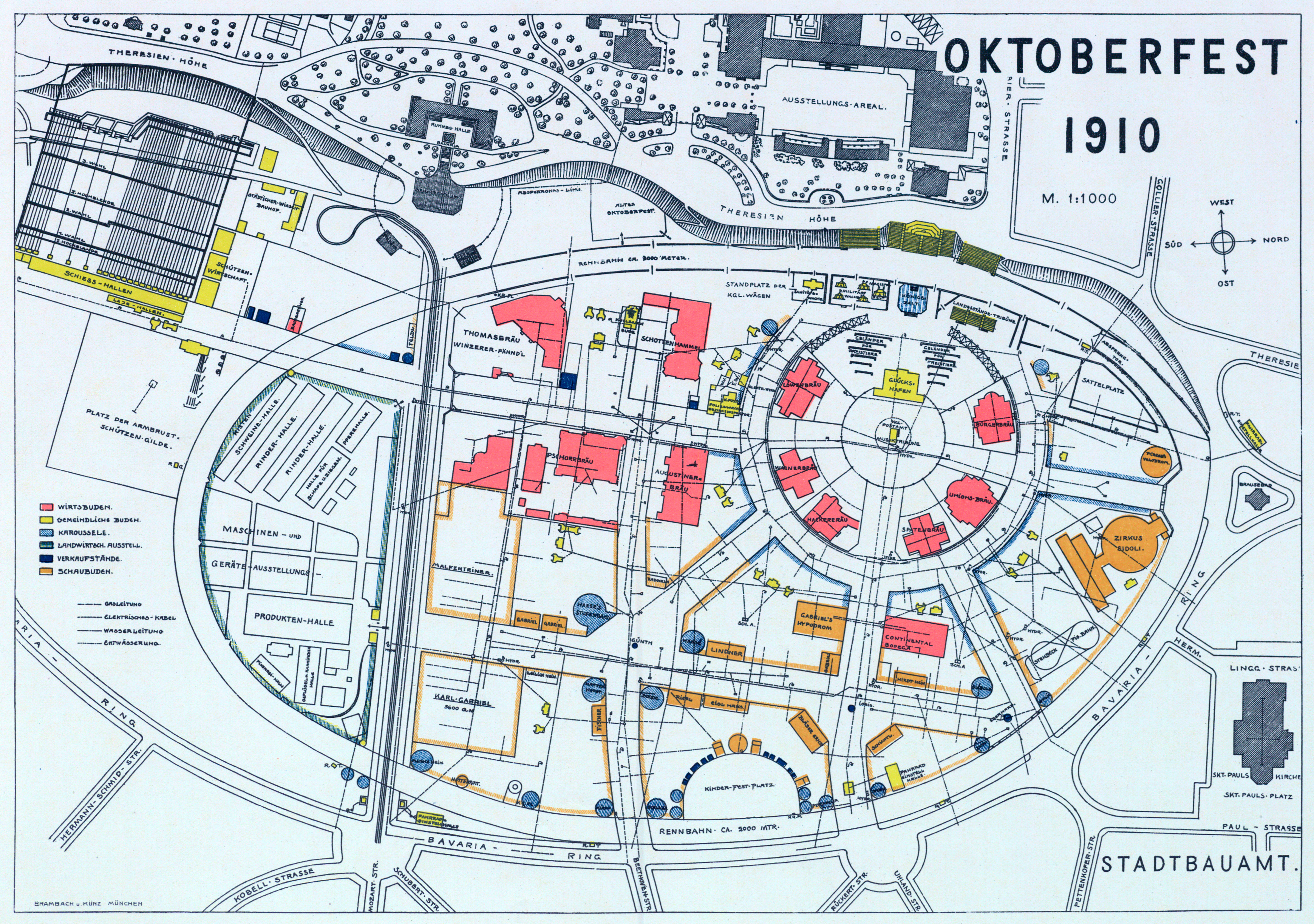 Plan Oktoberfest 1910, 1:1.000""